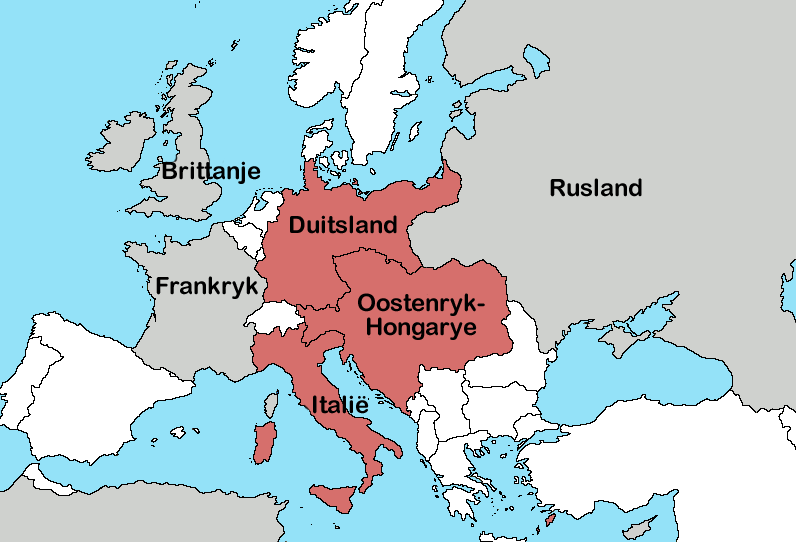 Die drie bondgenote van die Tripel Alliansie